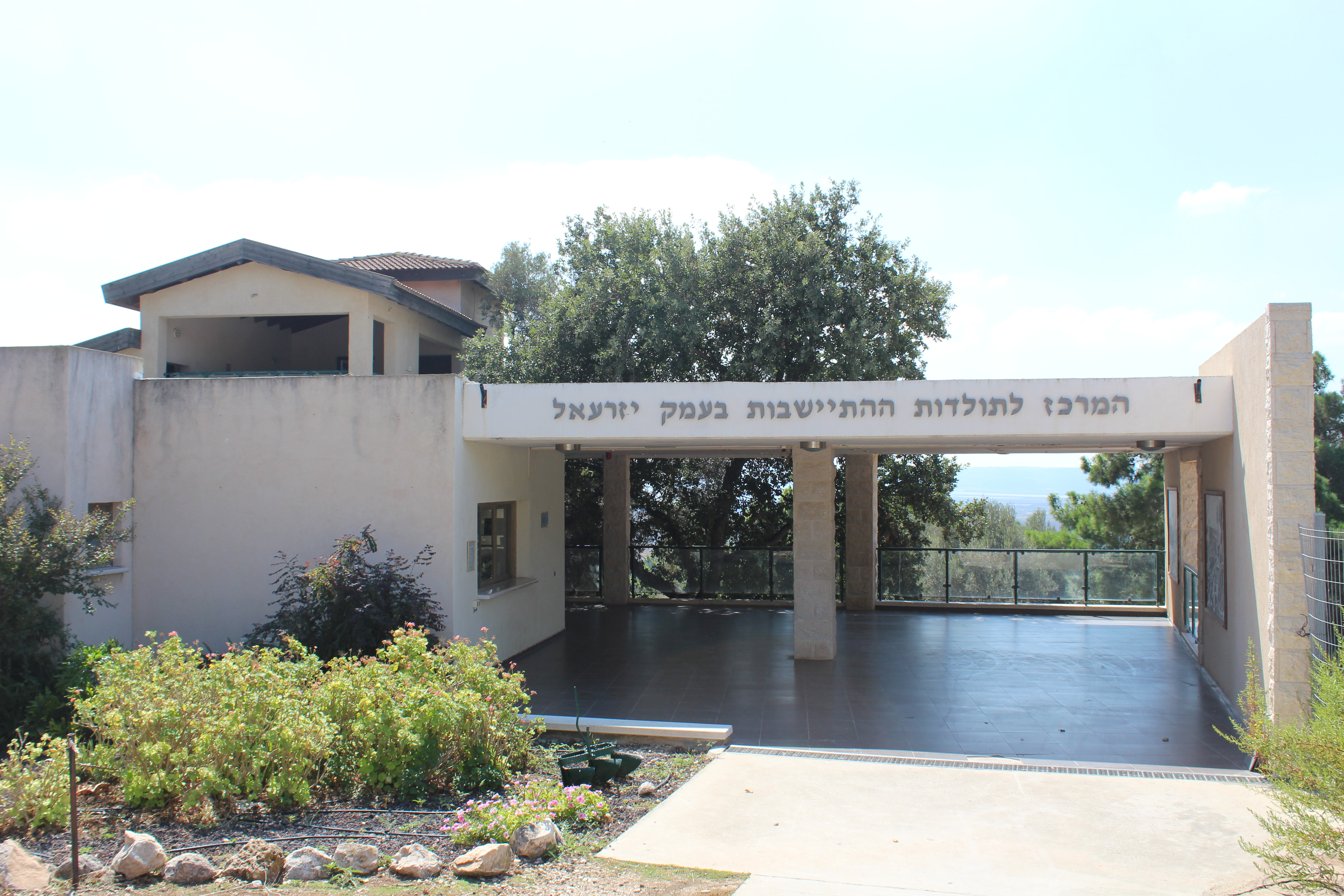 מוזיאון לראשית ההתיישבות בעמק בקיבוץ יפעת